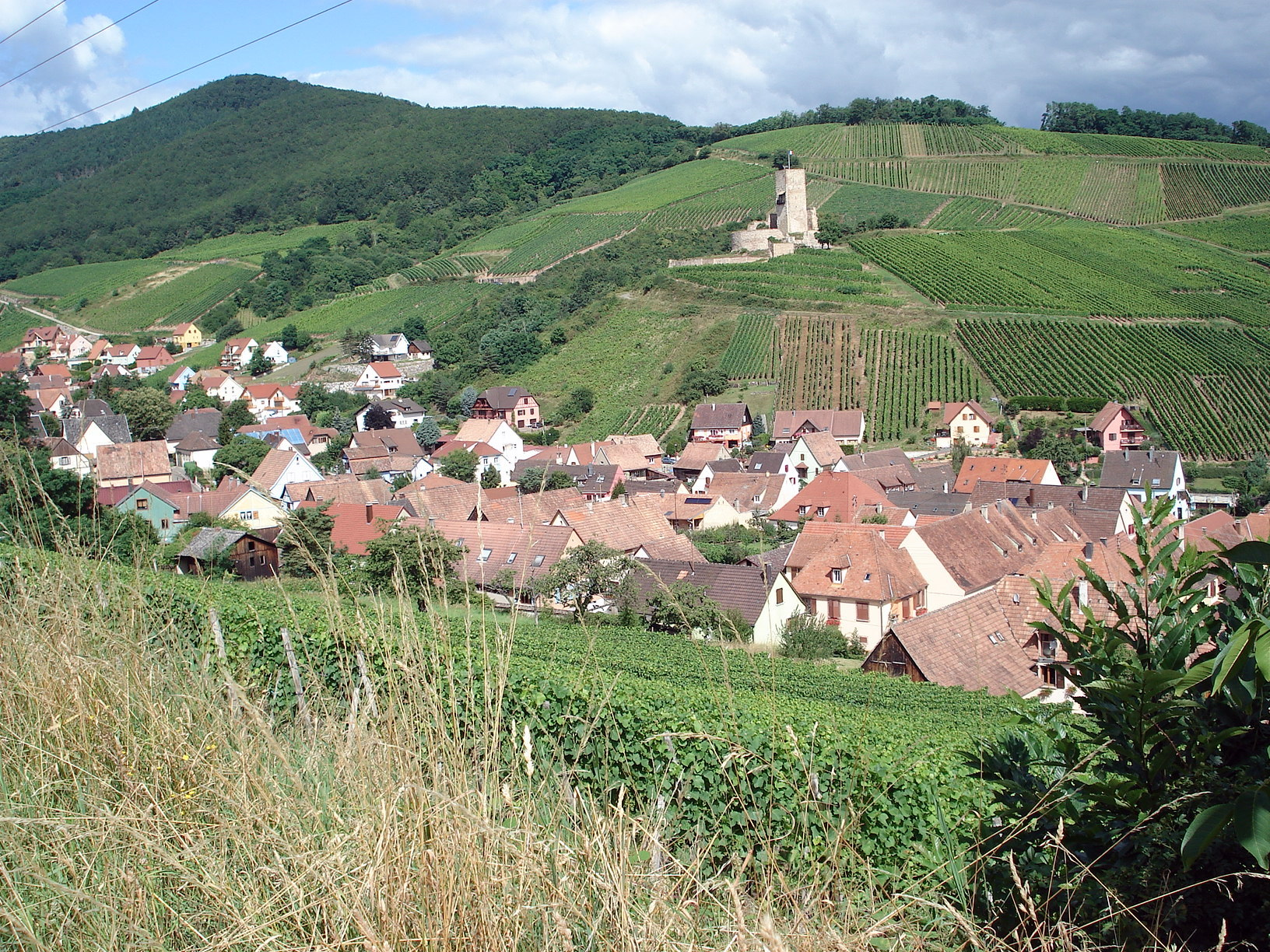 Katzenthal (Haut-Rhin, Alsace, France): partie occidentale de l'agglomération. Au second plan, château du Wineck, entouré de coteaux de vigne. Arrière-plan à gauche: montagnes des Vosges.